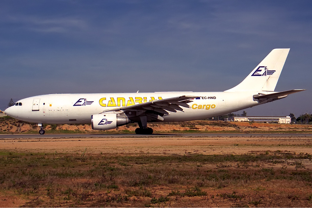 Canarias Cargo Airbus A300